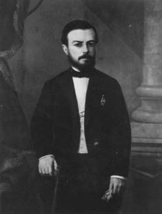 Obra da coleção Brasiliana Iconográfica.